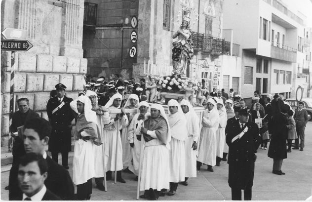 Processione durante la festa dell'Immacolata Concezione ad Alcamo, vicino Porta Palermo (8 dicembre, anni '60).